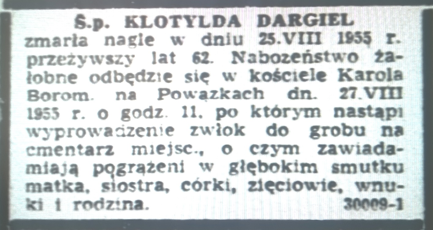 Nekrolog Klotyldy Dargiel zamieszczony w Życiu Warszawy z 1955 r., nr 204.